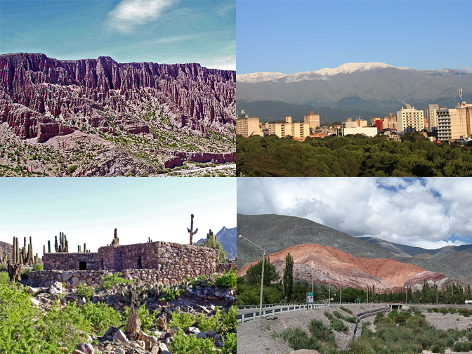 Montage de fotos de la Provincia de Jujuy